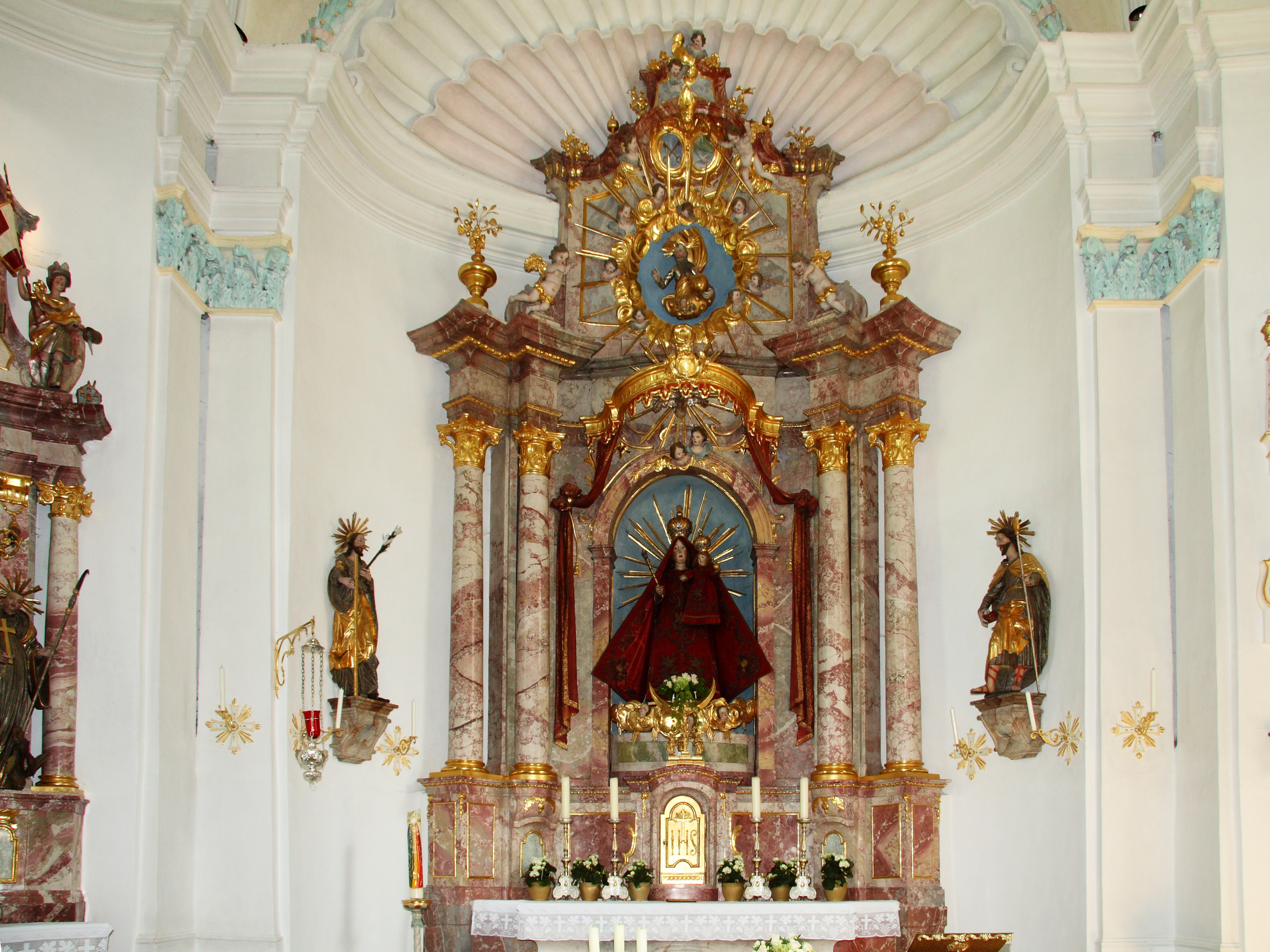 Im Innenraum der Heuwinklkapelle in Iffeldorf